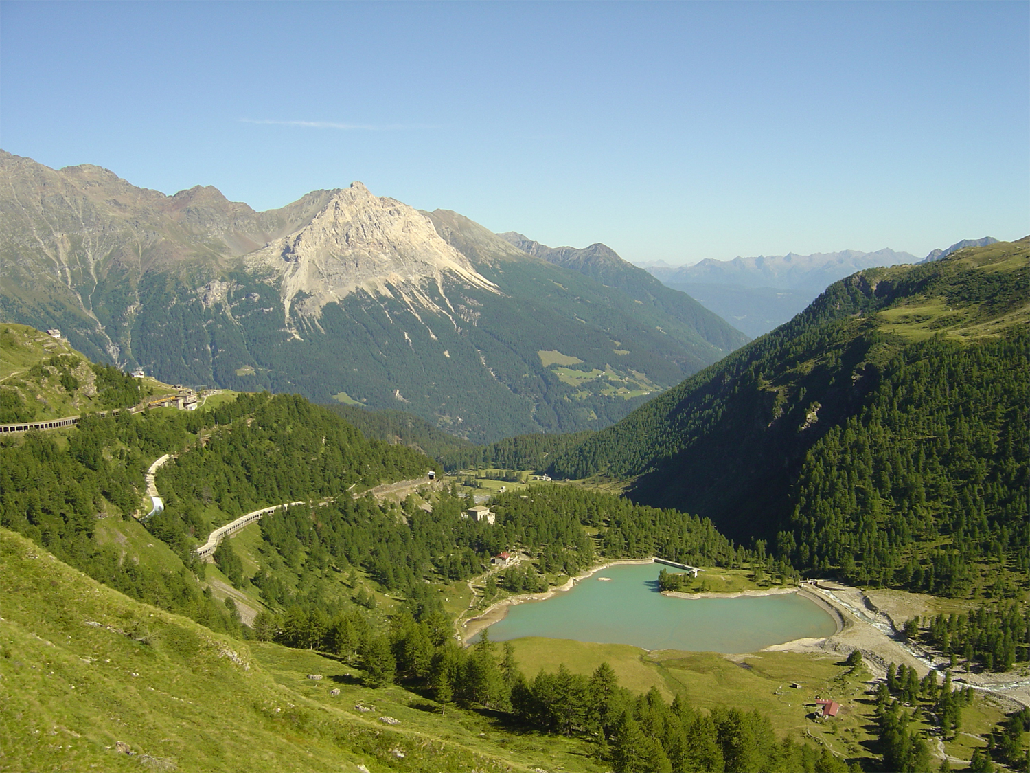 Die Station Alp Grüm der Rhätischen Bahn und der Lagh da Palü mit Blick ins Valposchiavo